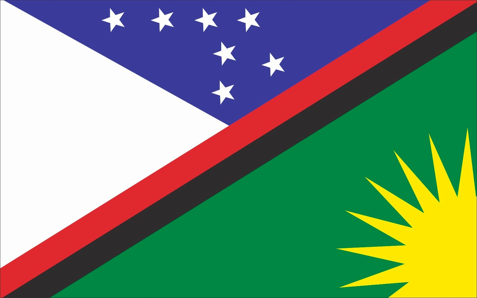 Bandeira do município de Amparo na Paraíba